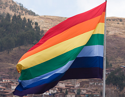 Rainbow flag above Plaza de Armas, Cusco, Peru.